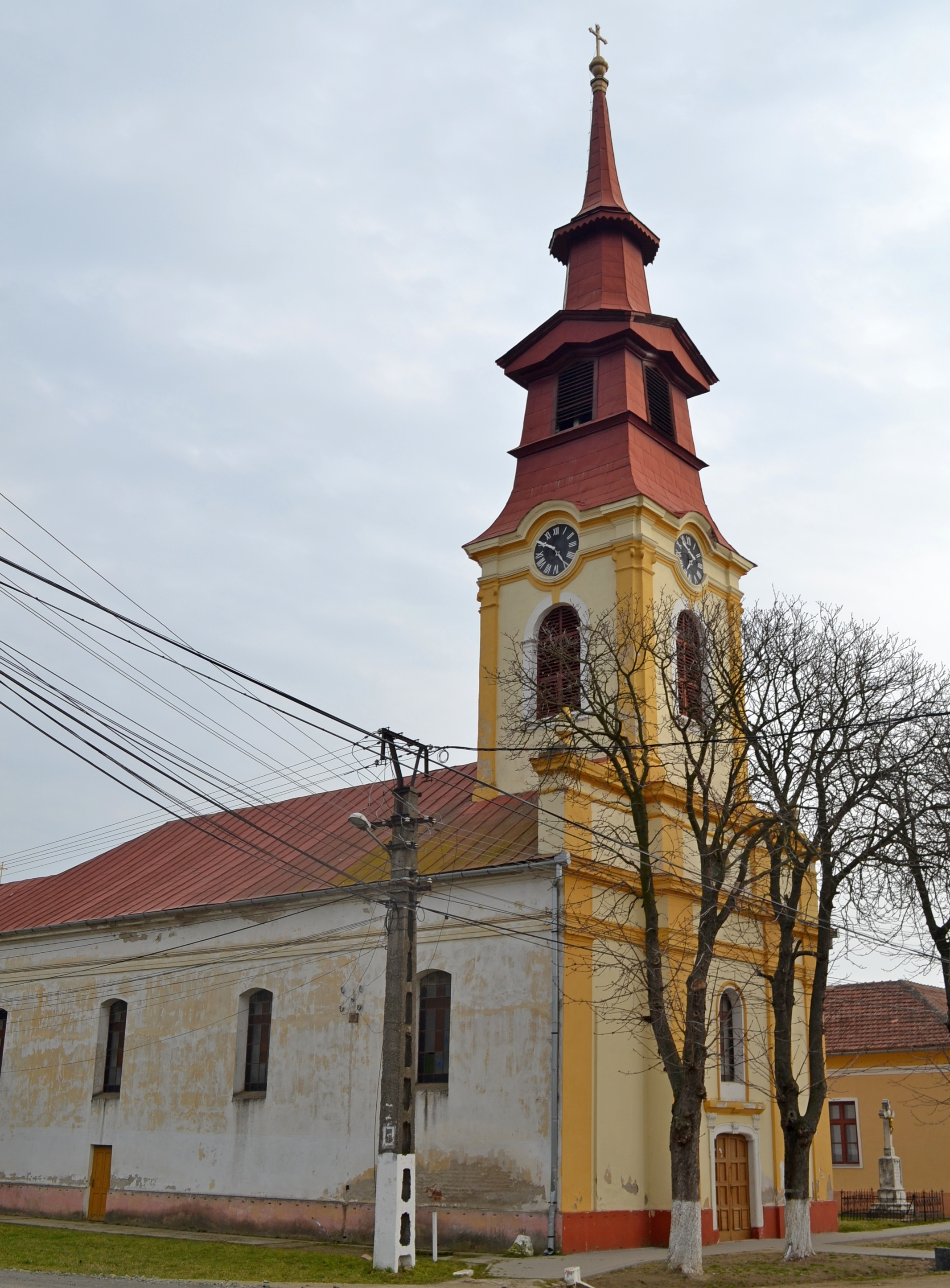 Biserica romano-catolică „Sf. Petru și Pavel”